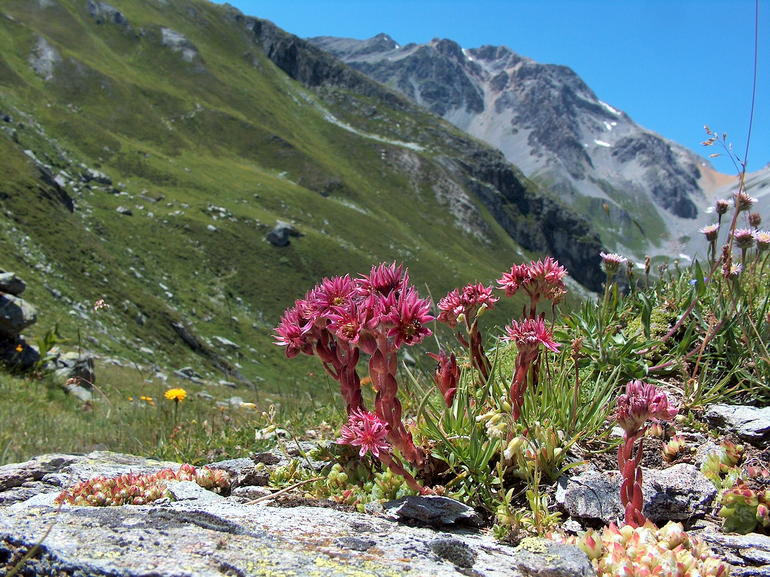 Joubarbe, Parc national de la Vanoise, et en arrière-plan le col rouge